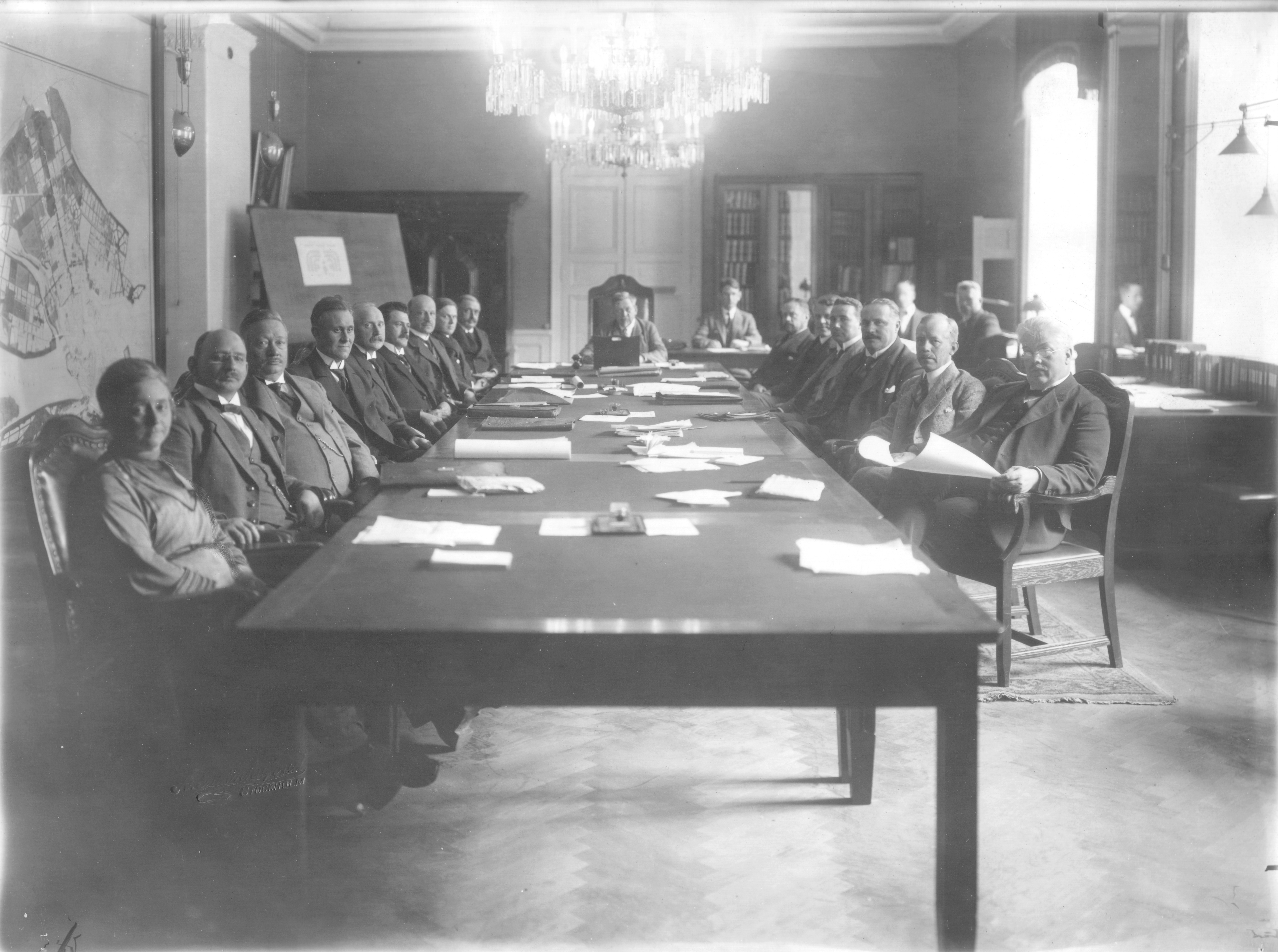 Stockholms stadskollegium sammanträder. Längst bak kanslichefen och stadssekreteraren Yngve Larsson.